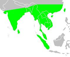 areale della specie